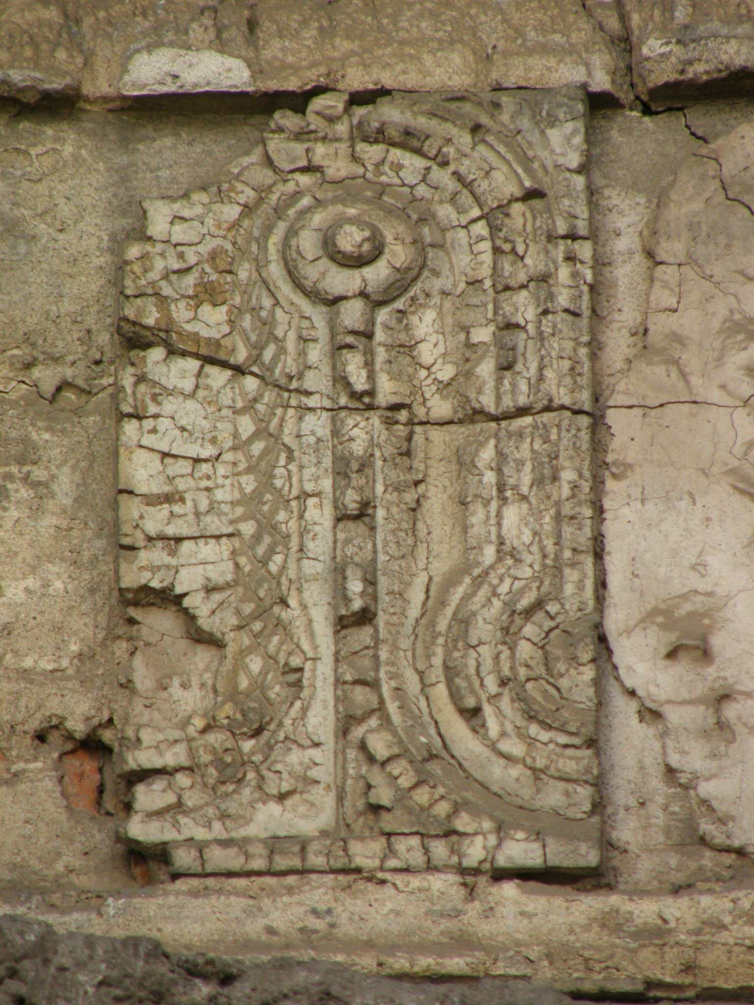 detail tempel poolstraße / apsis: Der Israelitische Tempel war die Reformsynagoge des 1817 gegründeten liberalen Neuen Israelitischen Tempel-Vereins in Hamburg